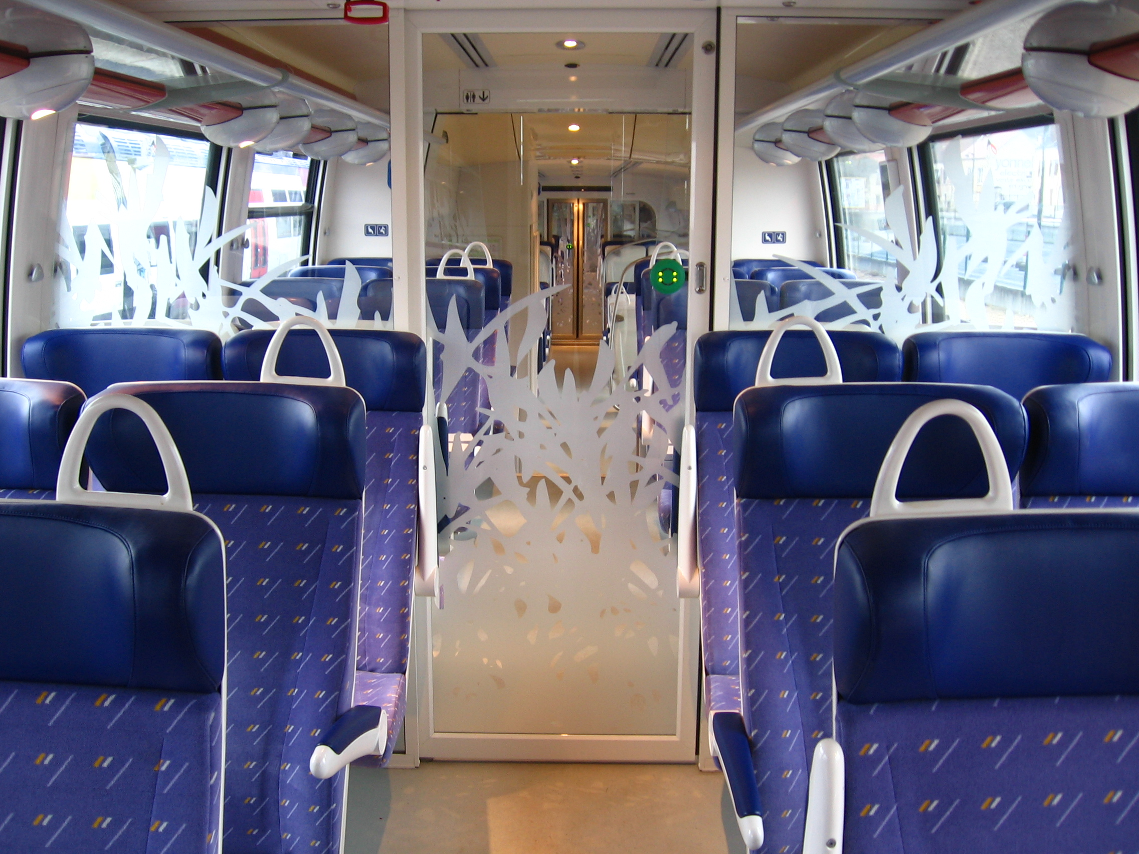 Intérieur d'une B 82500 Transilien (classe unique)